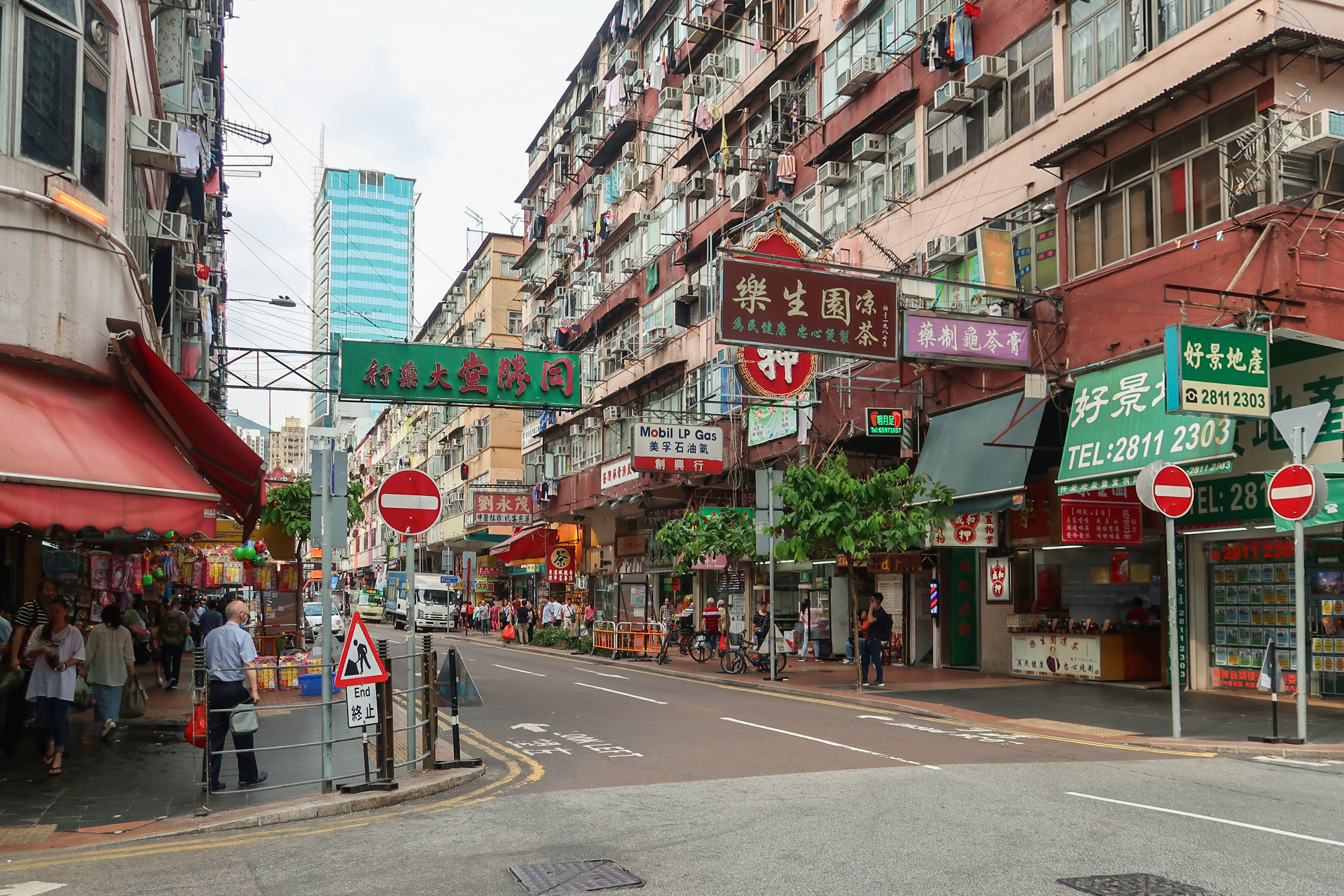 Chung On Street